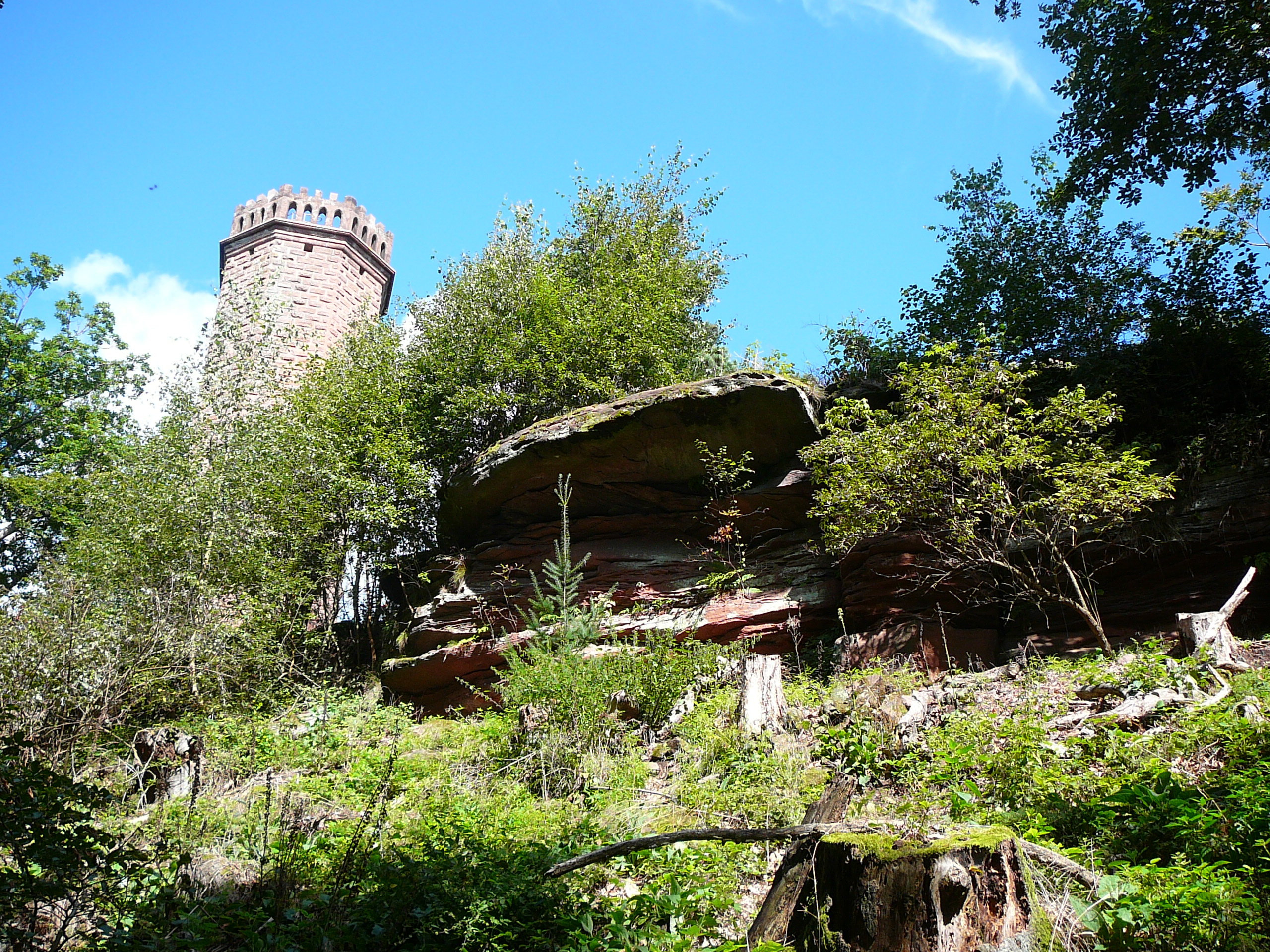 Felsenbiotop im Gipfelbereich des Rehbergs: Blick vom Nordhang zum Gipfel